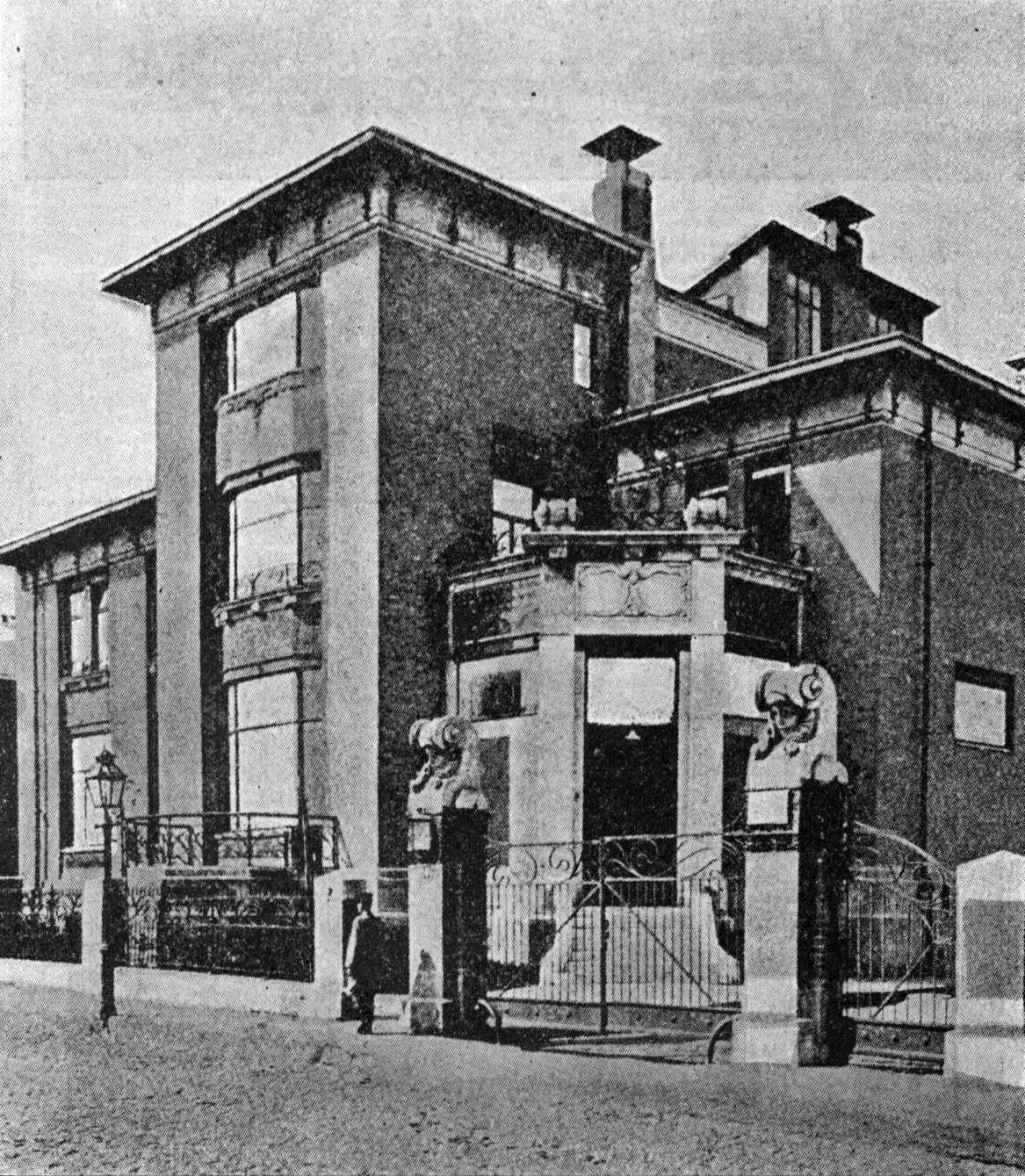 Особняк Якунчиковой